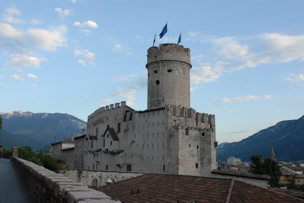 Castello del Buonconsiglio, Trento. Picture taken by Giovanni Iachello.